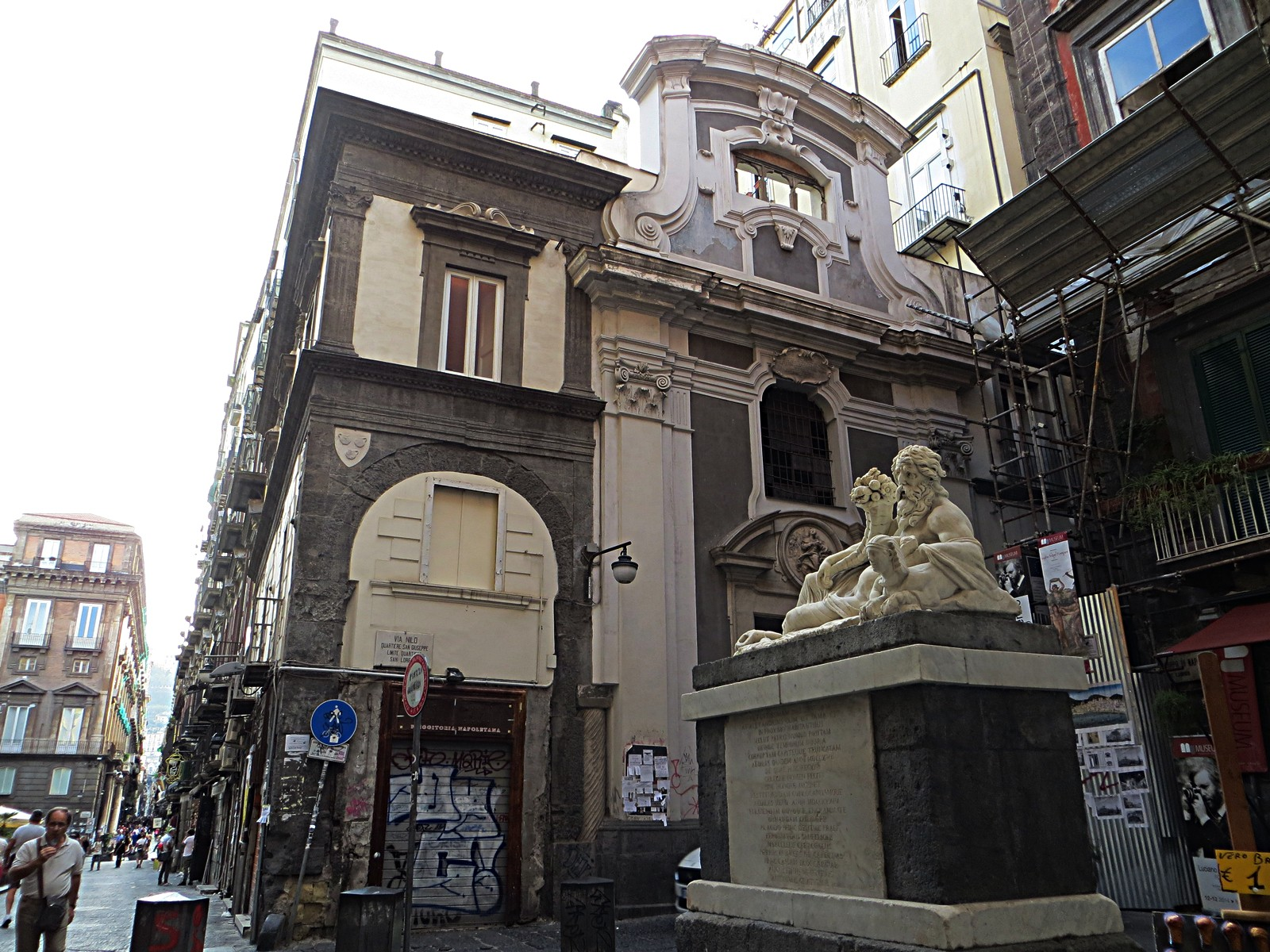 Chiesa di Santa Maria Assunta dei Pignatelli